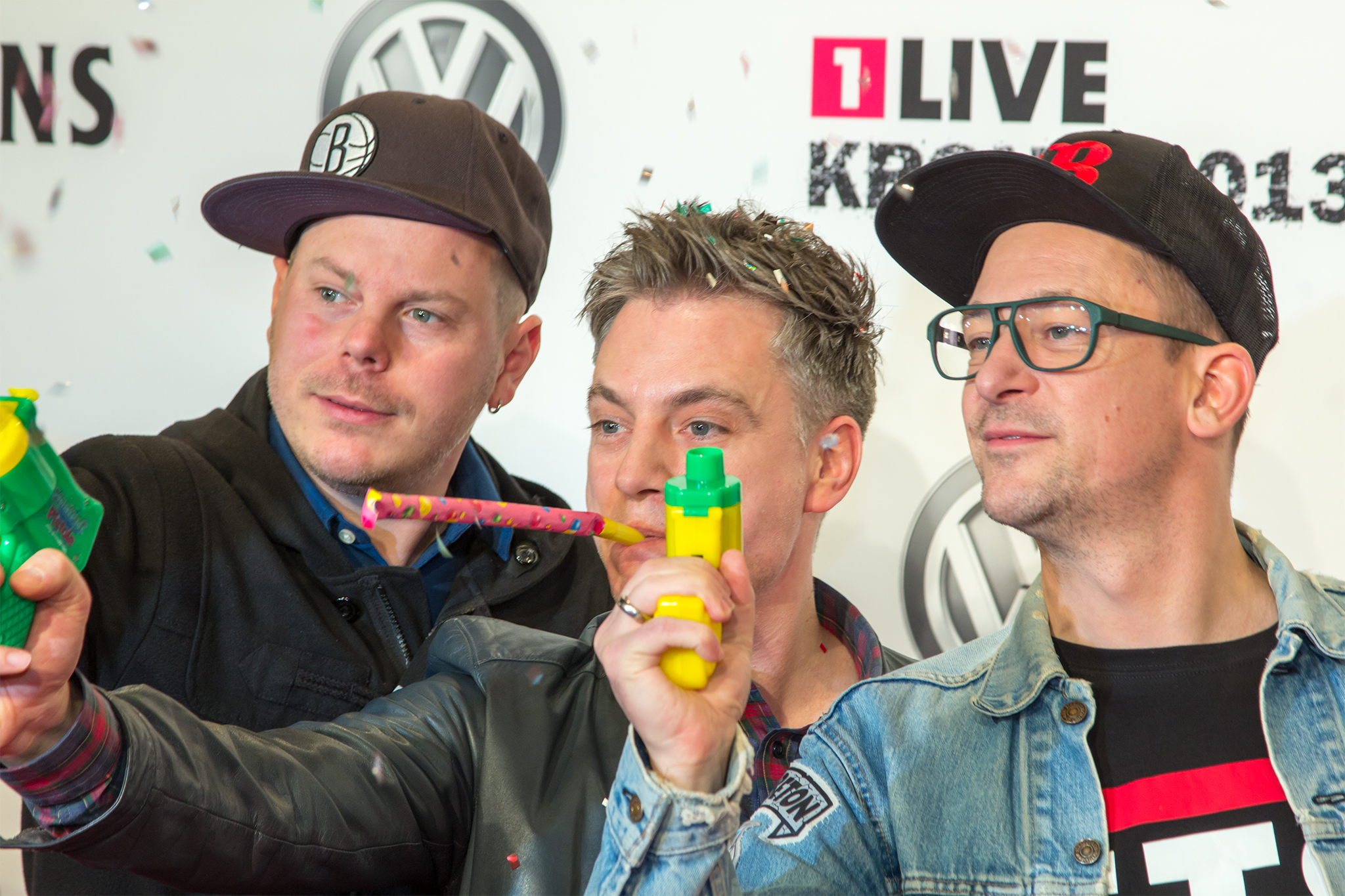 1LIVE Krone 2013: Fettes Brot auf dem roten Teppich,v. l. n. r.: Boris Lauterbach (König Boris), Martin Vandreier (Dokter Renz), Björn Warns (Björn Beton)